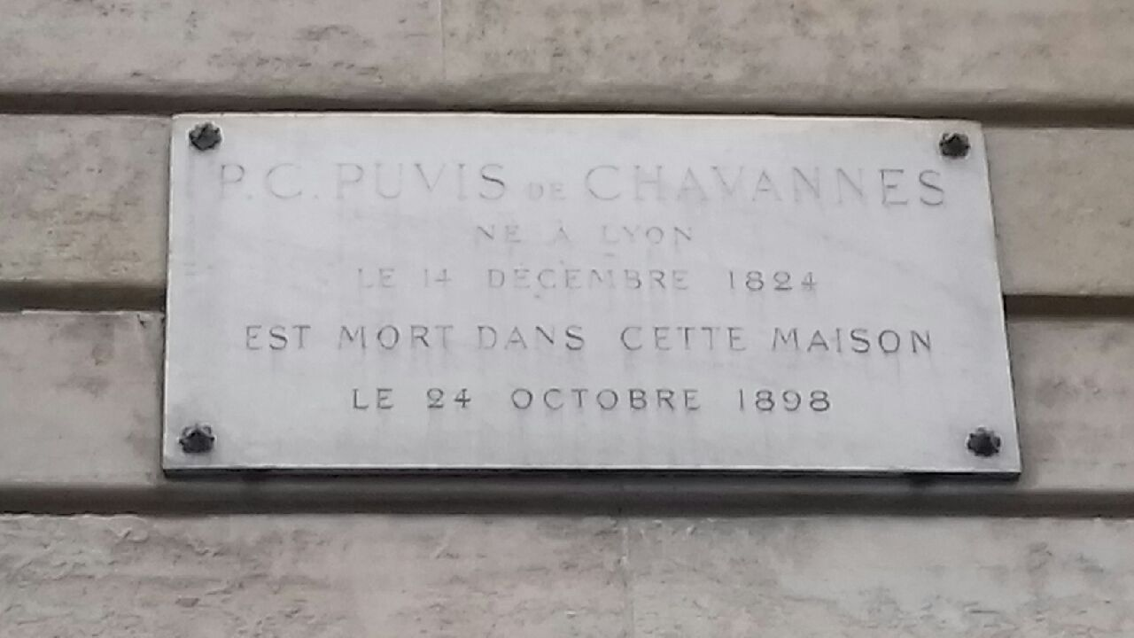 Plaque commémorative de Pierre PUVIS de CHAVANNES au 89 avenue de Villiers (Paris 17e). Immeuble où il est décédé.